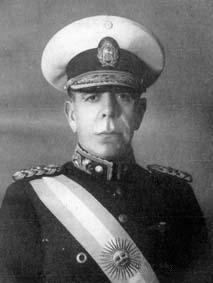 farrel